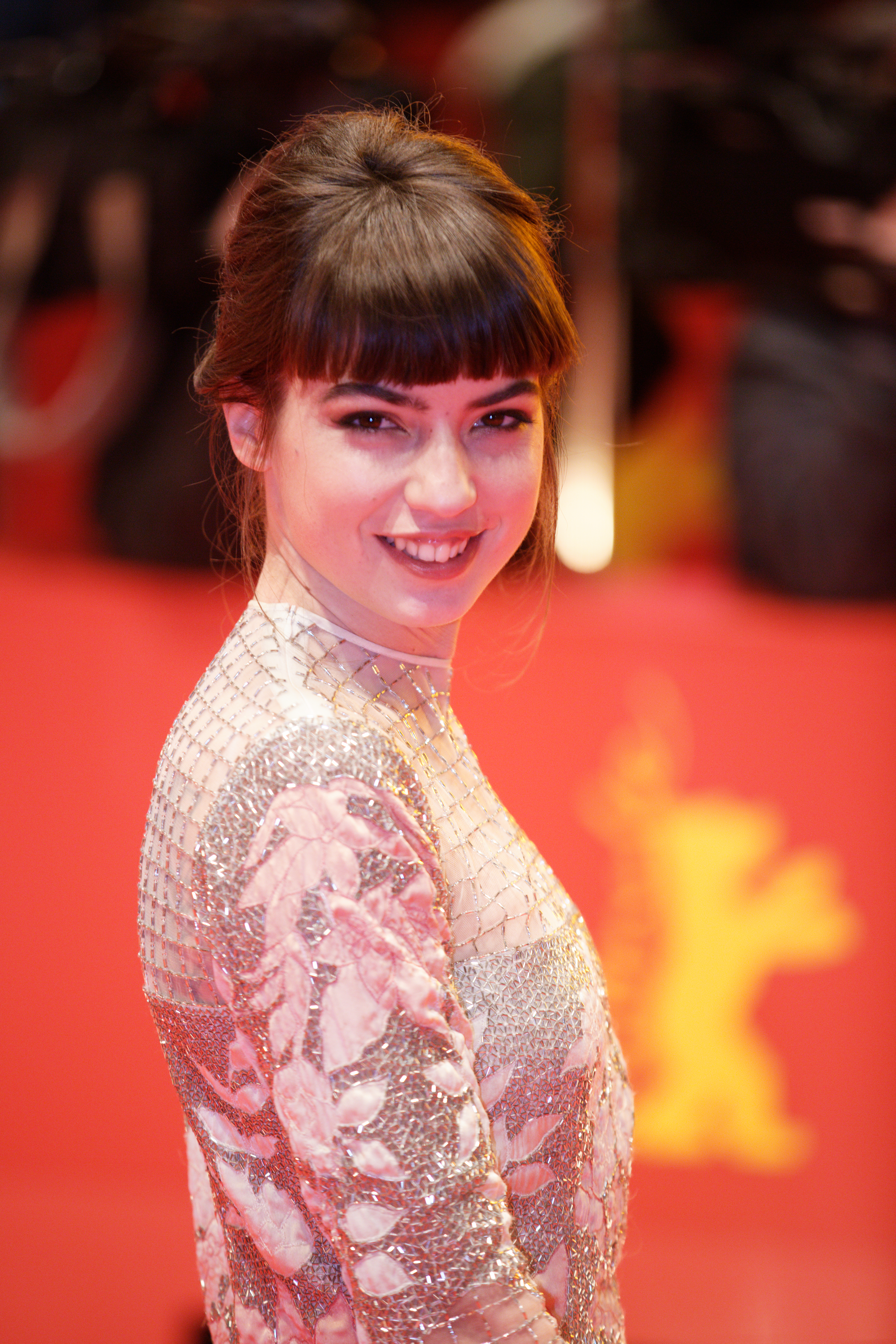 Anjela Nedyalkova auf dem Roten Teppich zu T2 Trainspotting im Rahmen der Berlinale 2017